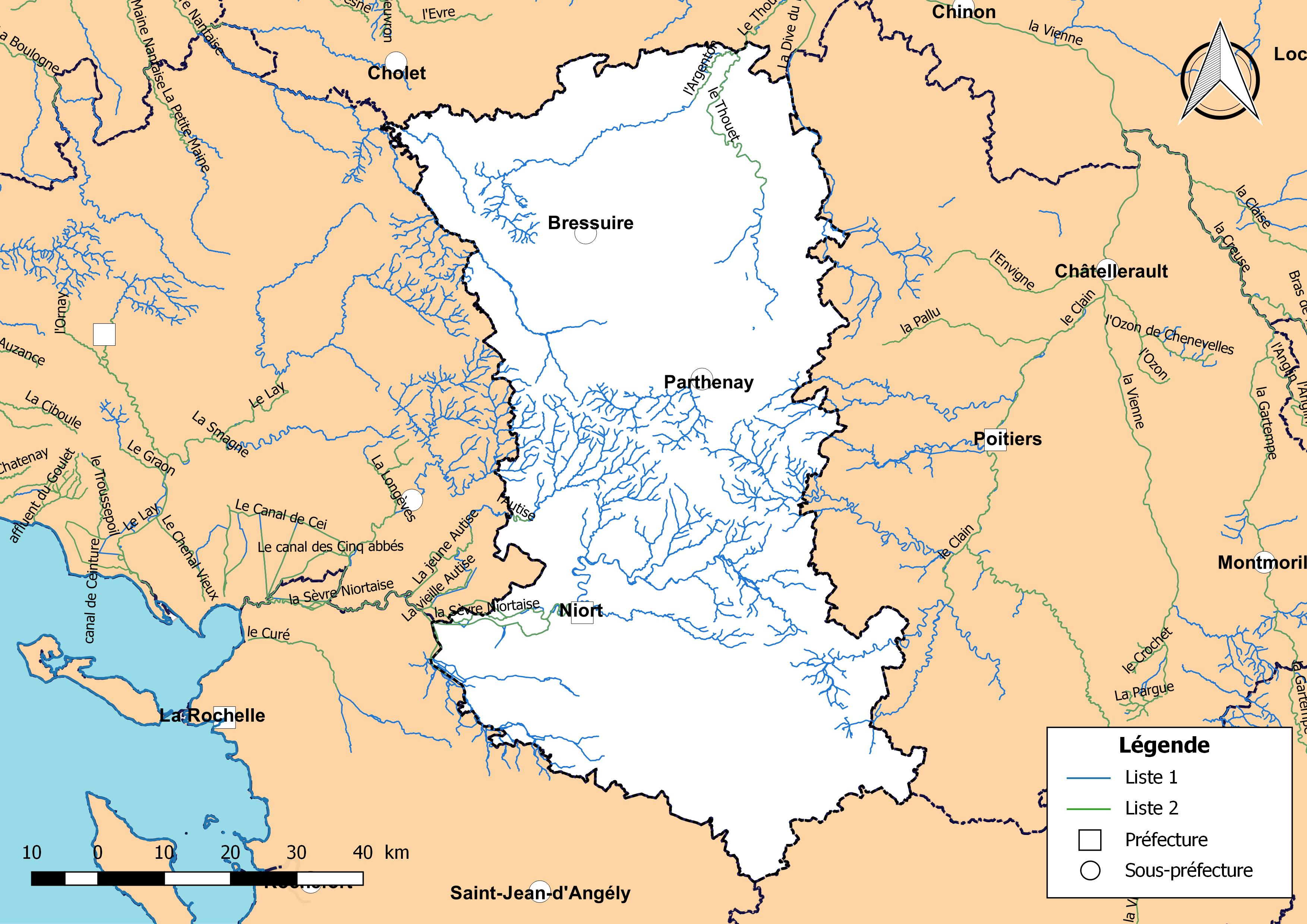 Classement des cours d'eau du département des Deux-Sèvres (France) au titre de la continuité écologique (article L214.17 I du Code de l'environnement).